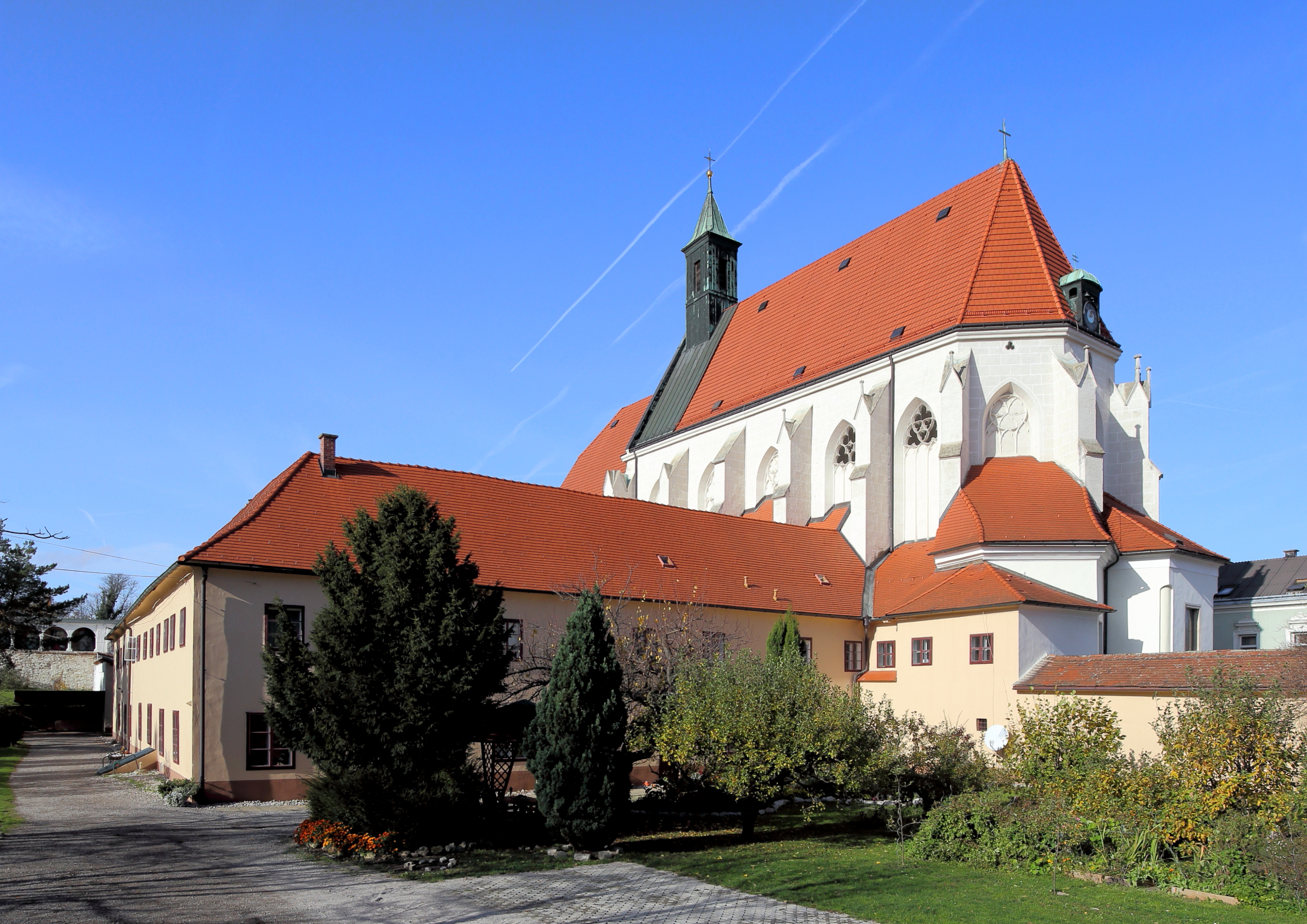 Südostansicht des Kapuzinerklosters in der niederösterreichischen Bezirkshauptstadt Wiener Neustadt. Die Klosteranlage besteht aus der hochgotischen ehemaligen Minoritenkirche (um 1330) und dem südlich anschließenden Klostergebäude, ein zweigeschossiger, frühbarocker Vierflügelbau mit quadratischem Hof.